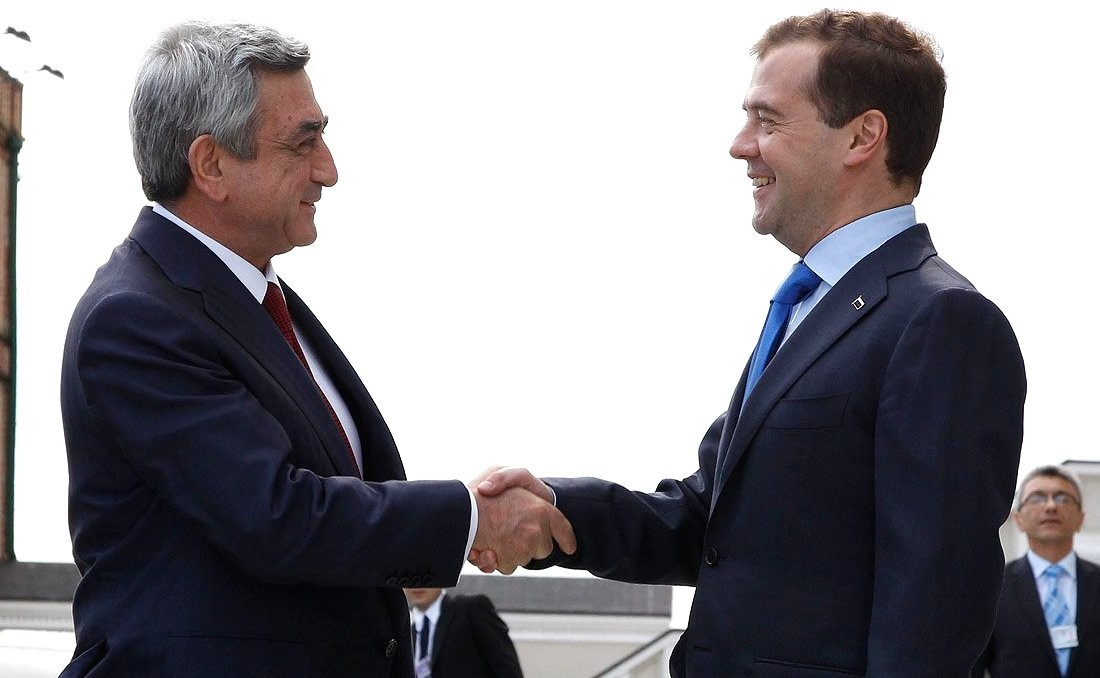 С Президентом Армении Сержем Саргсяном.